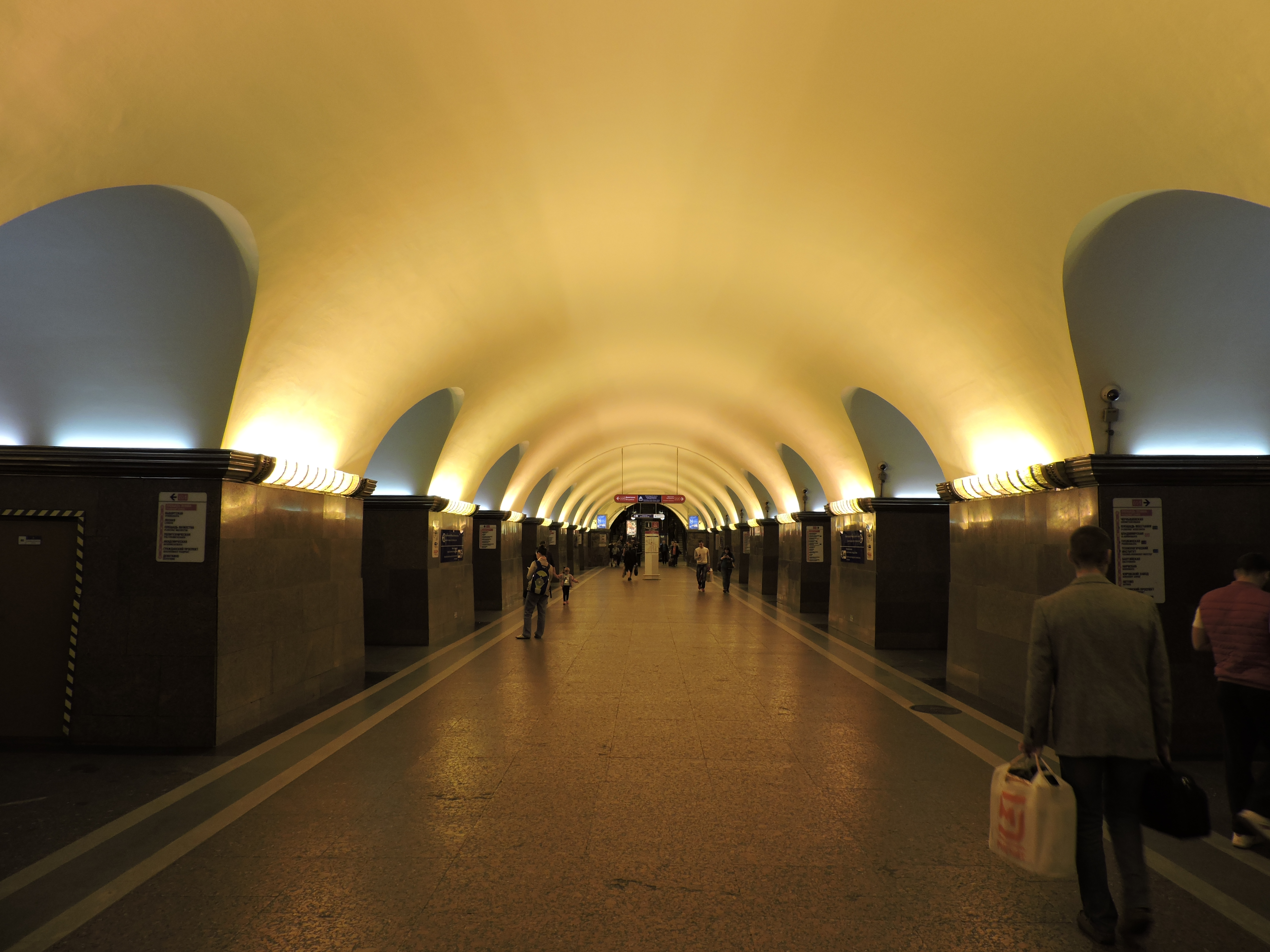 Ploshchad Lenina (Saint Petersburg Metro station)